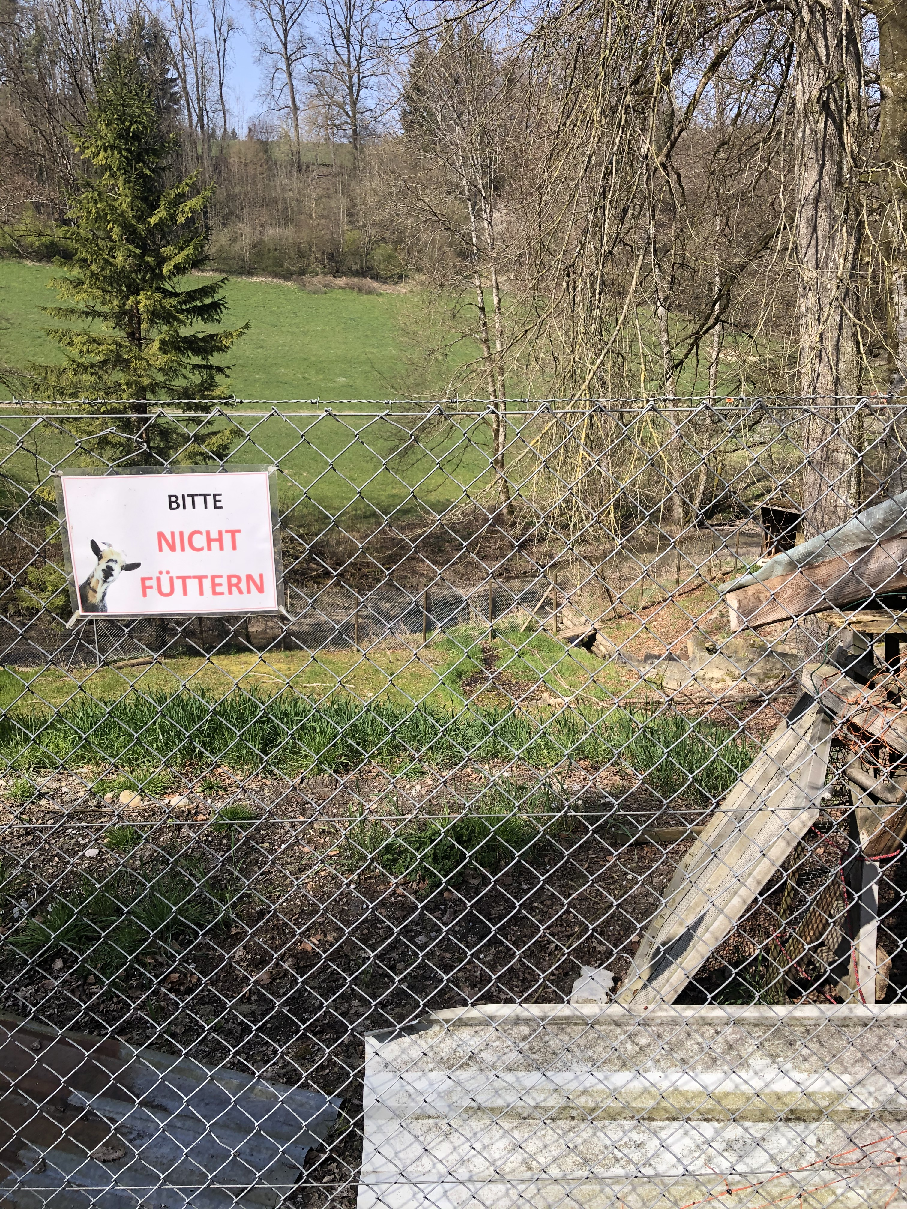 ehemaliger Tierpark Gäbelbach Gehege